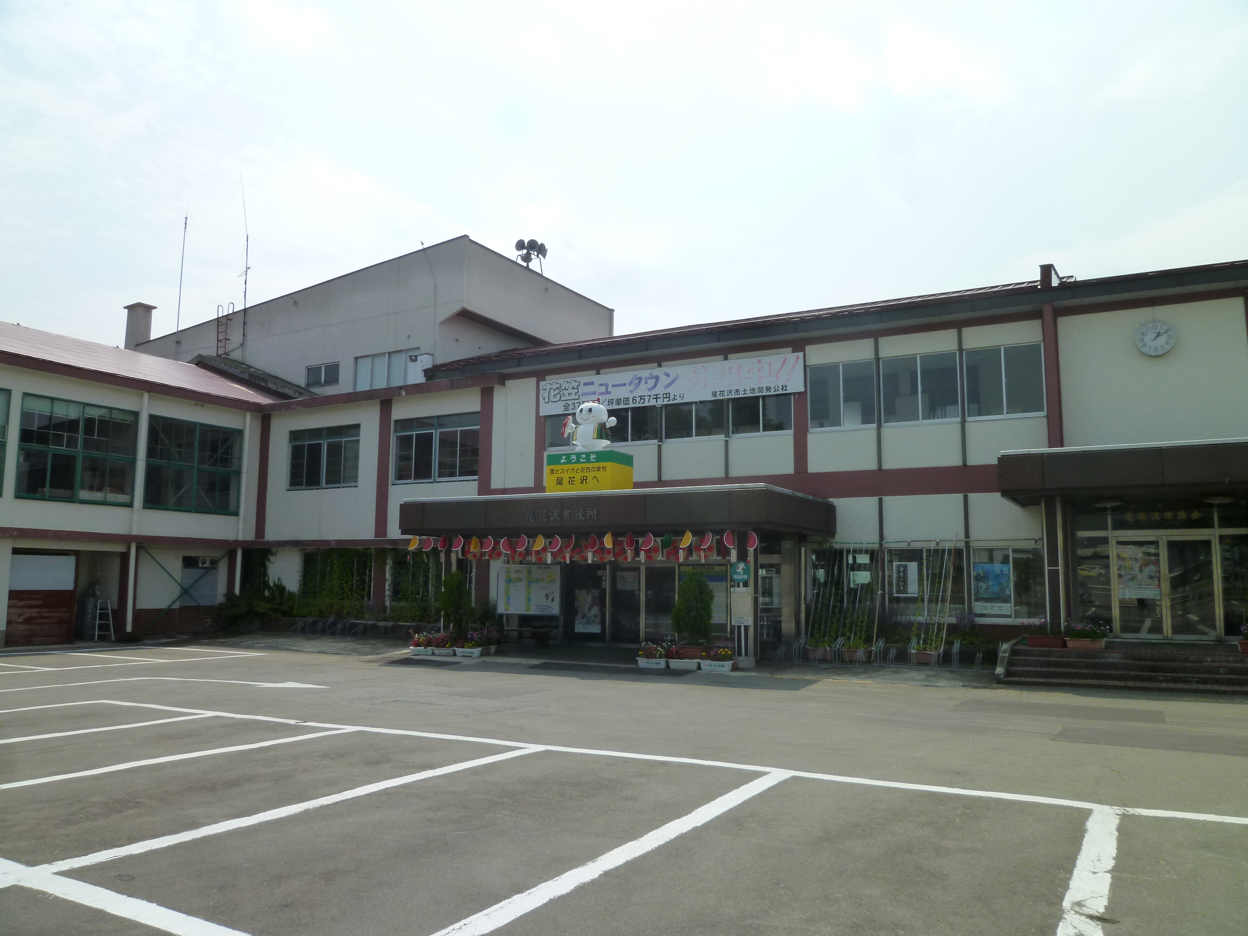 尾花沢市役所。山形県尾花沢市若葉町に所在。